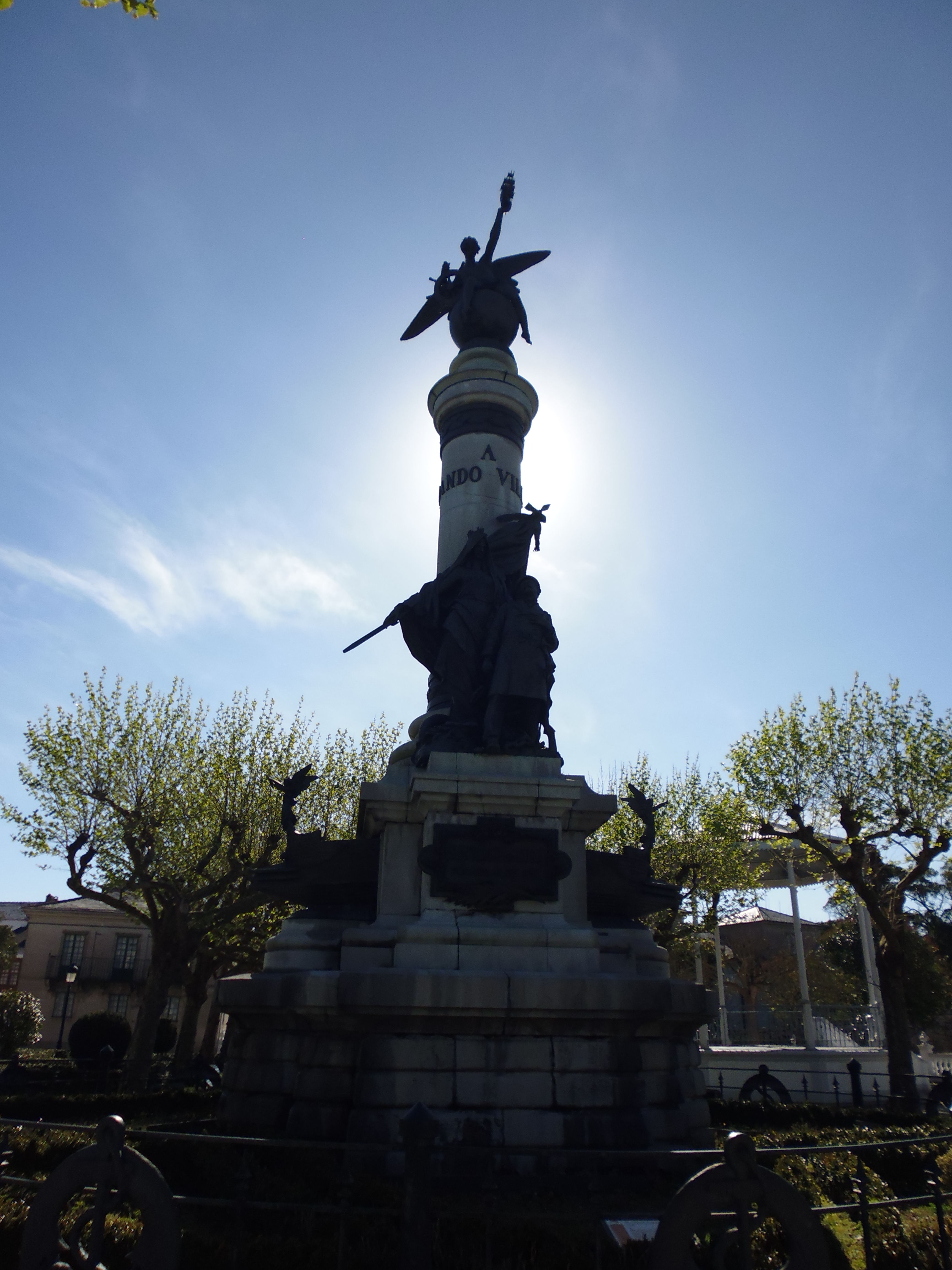 Estatua situada en el Parque Vicente Loriente de Castropol